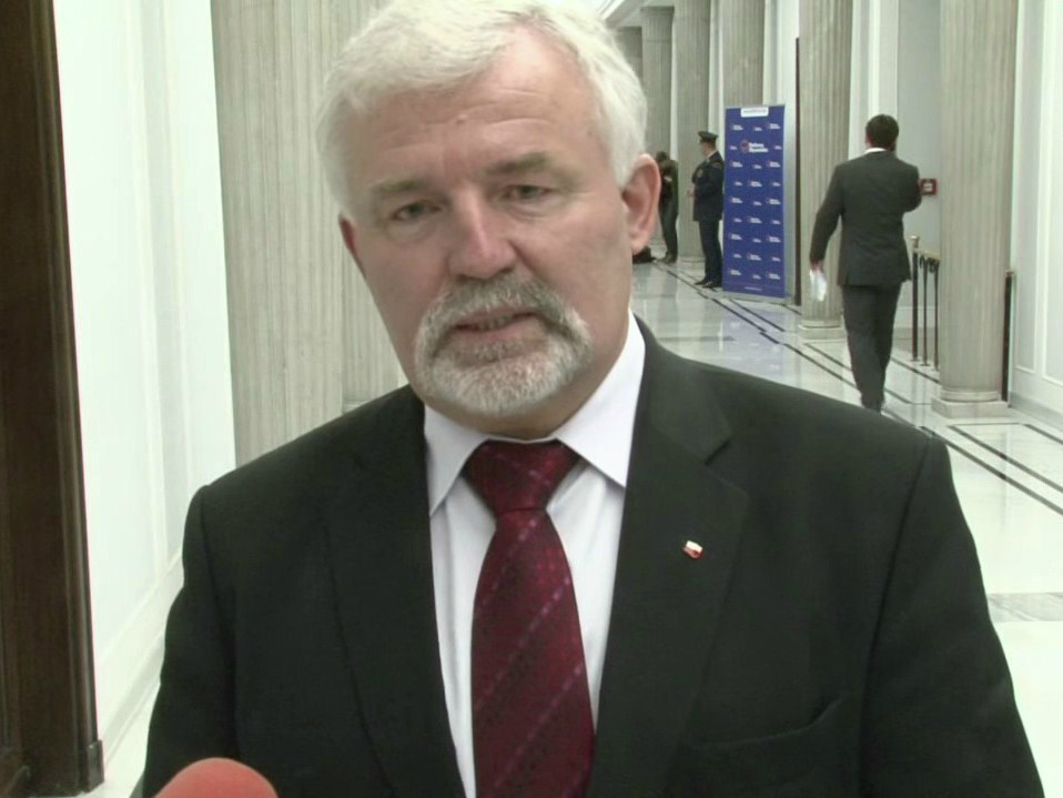 Ryszard Zbrzyzny, inżynier górnik, działacz związkowy, lewicowy polityk, poseł na Sejm.